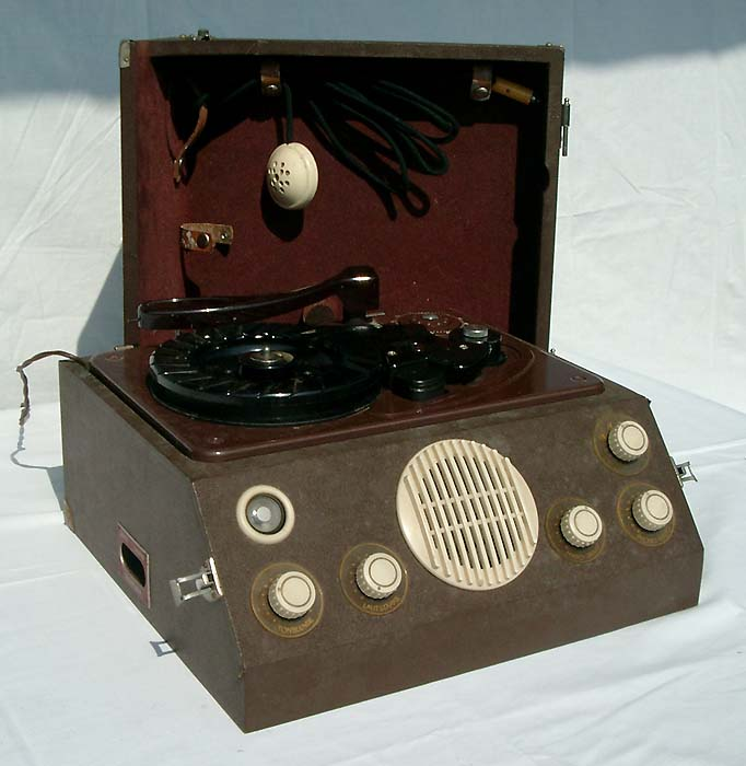 Reichhalter Reporter W102 Drahttongerät